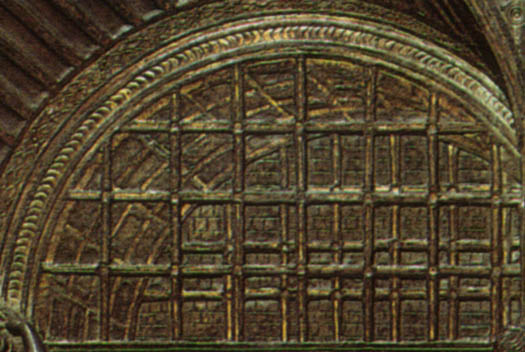 Donatello, miracolo dell'asina, dettaglio 01